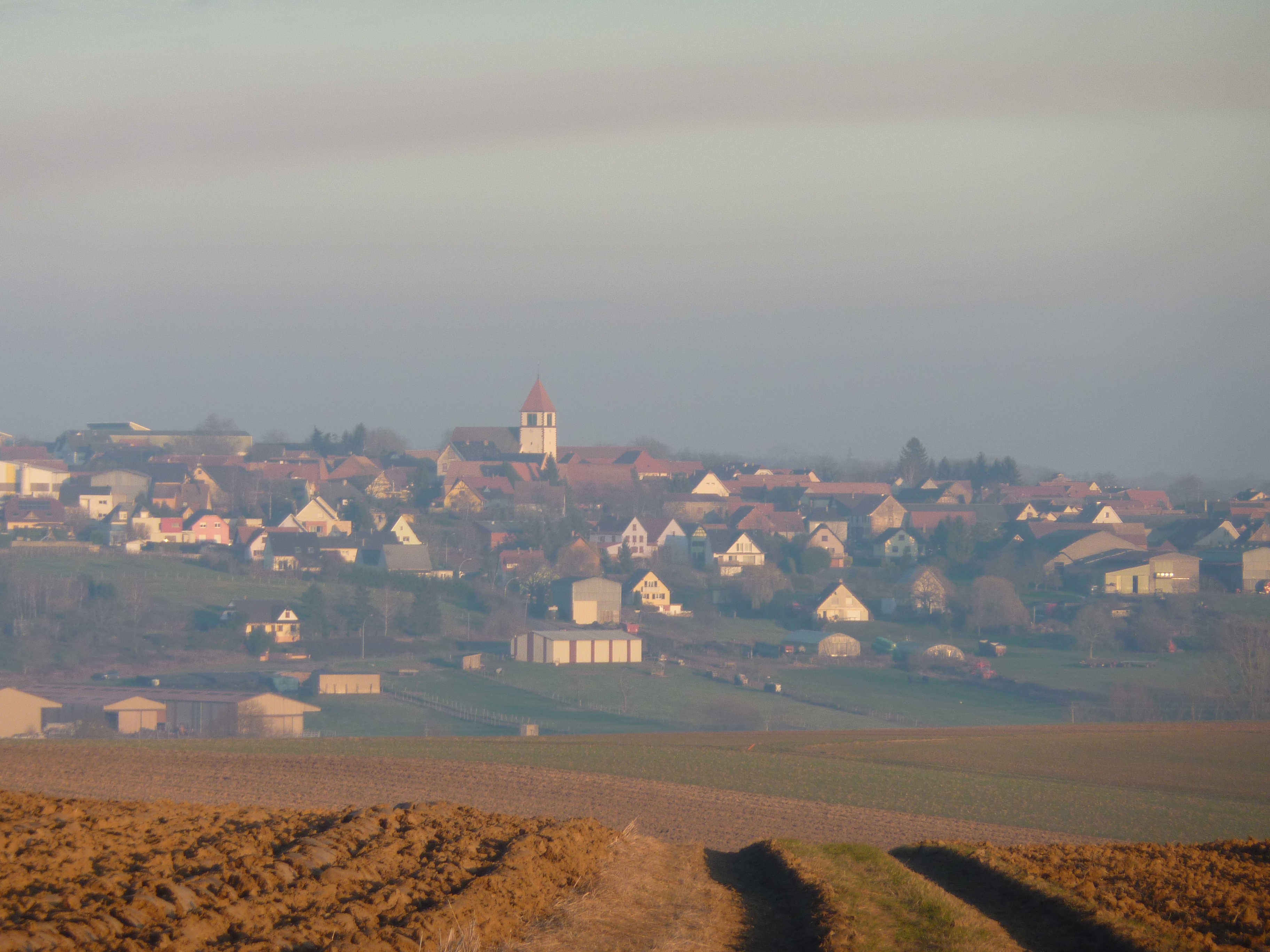 Village de Minversheim vu depuis la RD 25